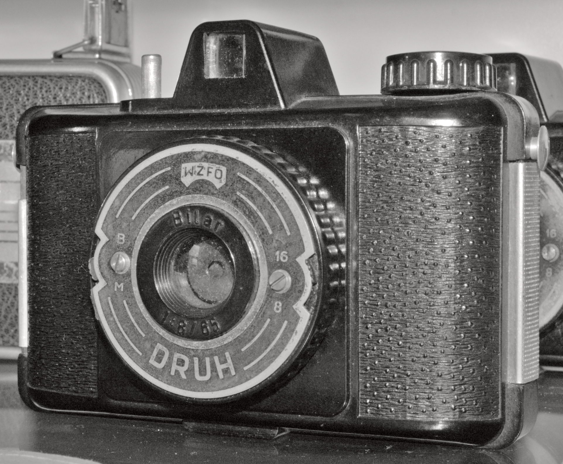 Druh WZFO